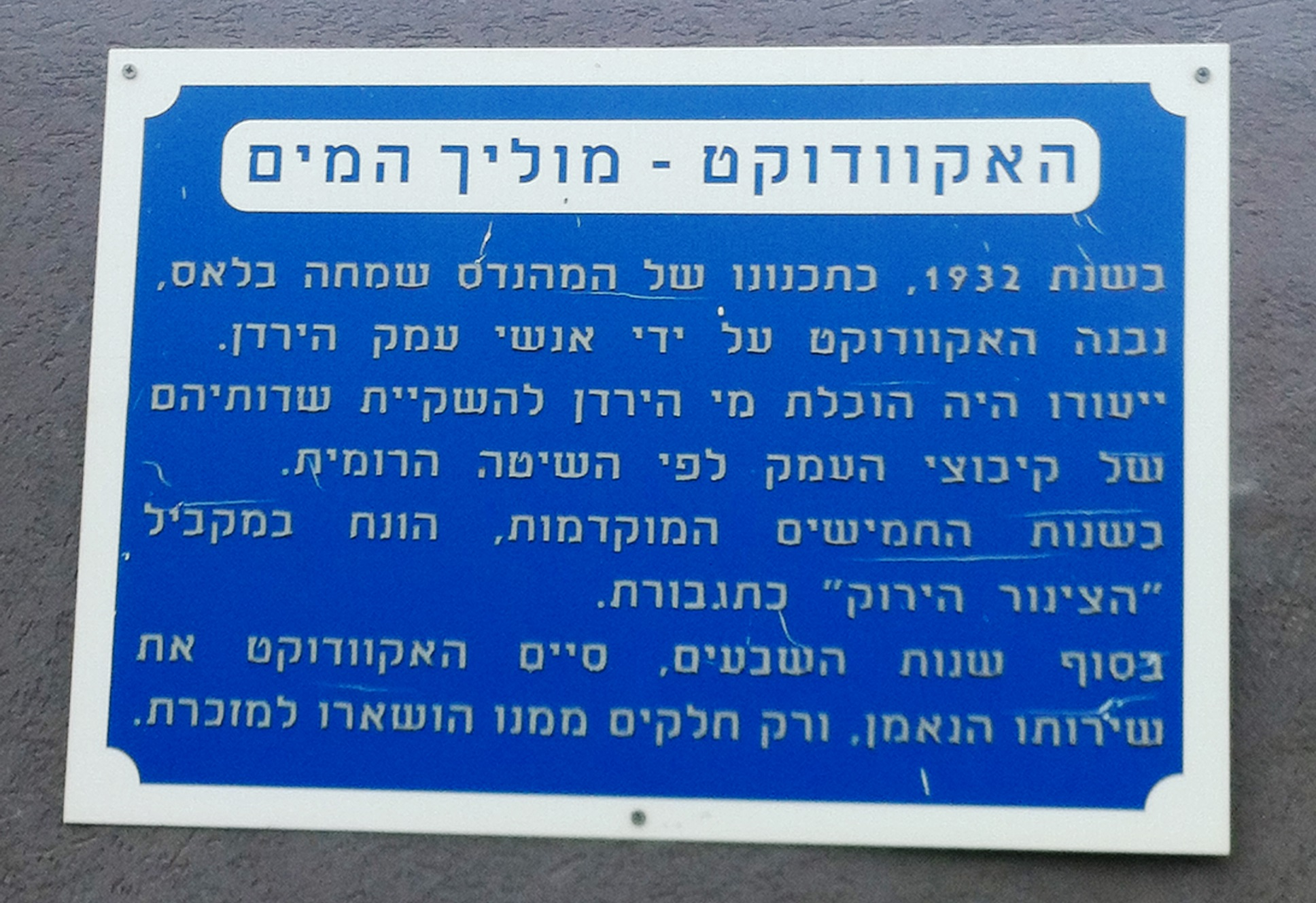 האקוודוקט - אמת המים מהירדן לשדות הקיבוצים